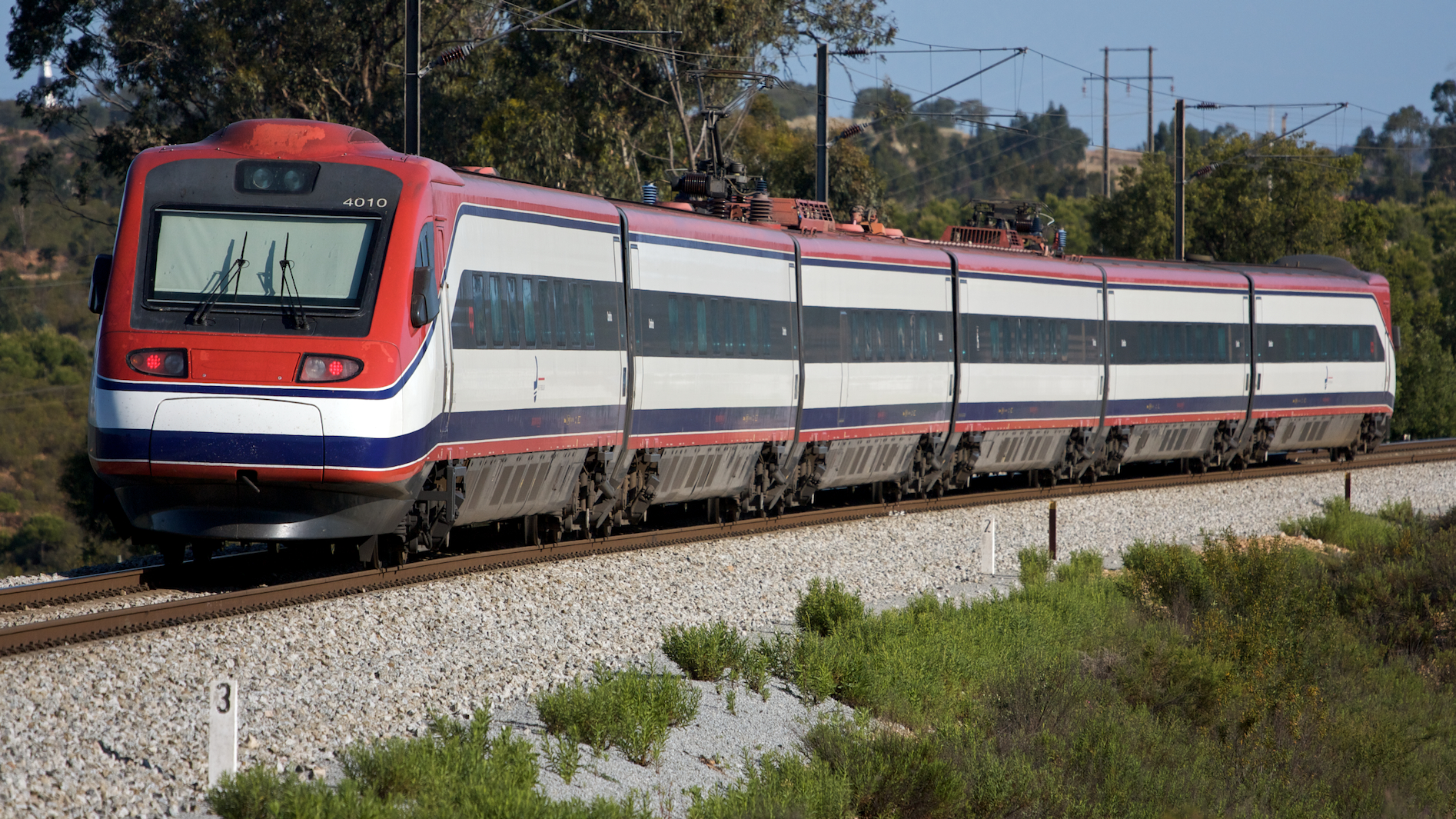 Tipo: Comboio Alfa Pendular 182 [Faro - Porto • Campanhã] Local: Lousal [Linha do Sul, PK 126] Data e hora: 19 de Maio de 2009 [08h38] Material: Automotora 4010 [Comboio de Pendulação Activa]